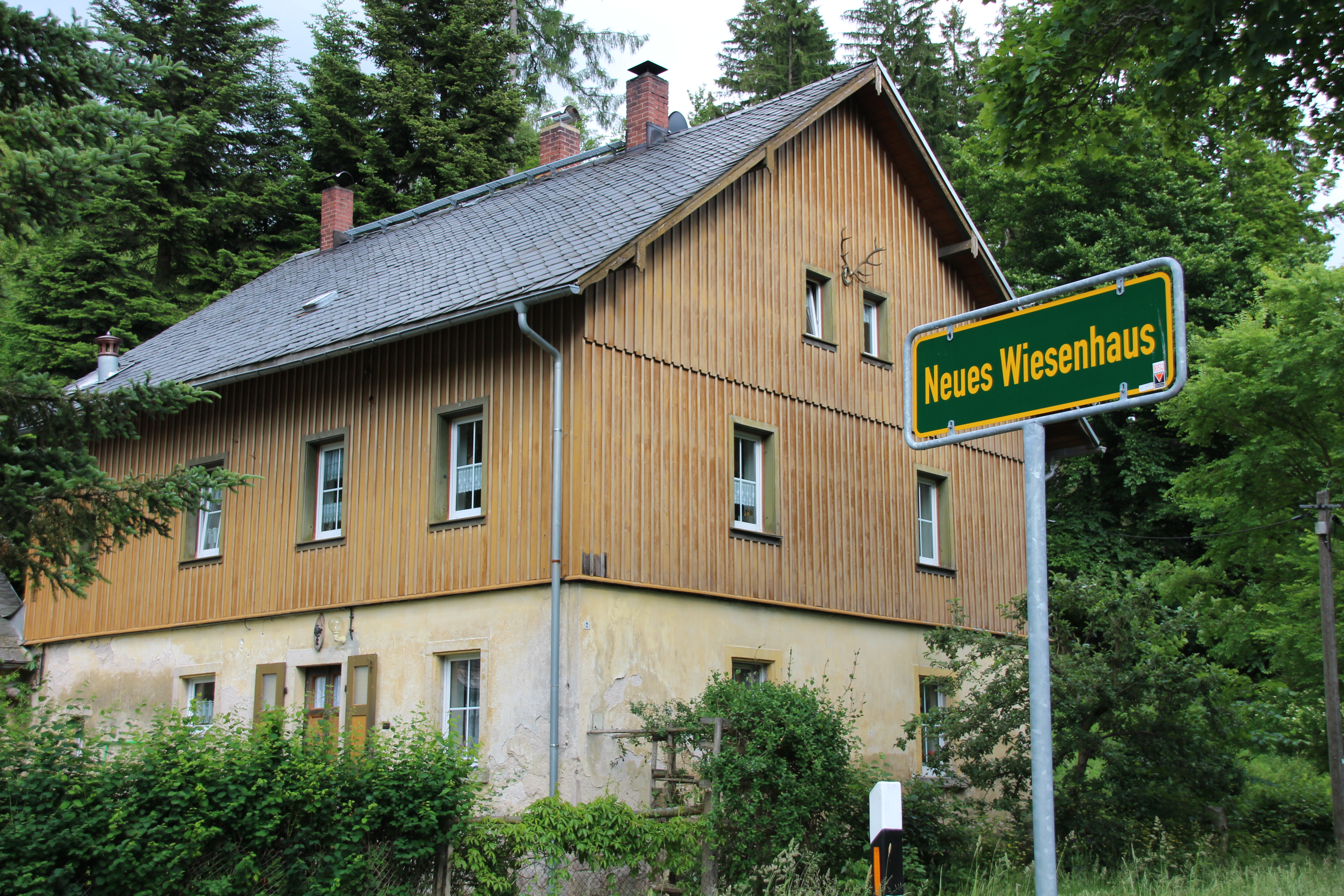 Früheres Forsthaus in Neues Wiesenhaus, eine Siedlung von wenigen Häusern an der Wilzsch oberhalb von Wilzschhaus. Diese Siedlung ist ein Teil von Eibenstock